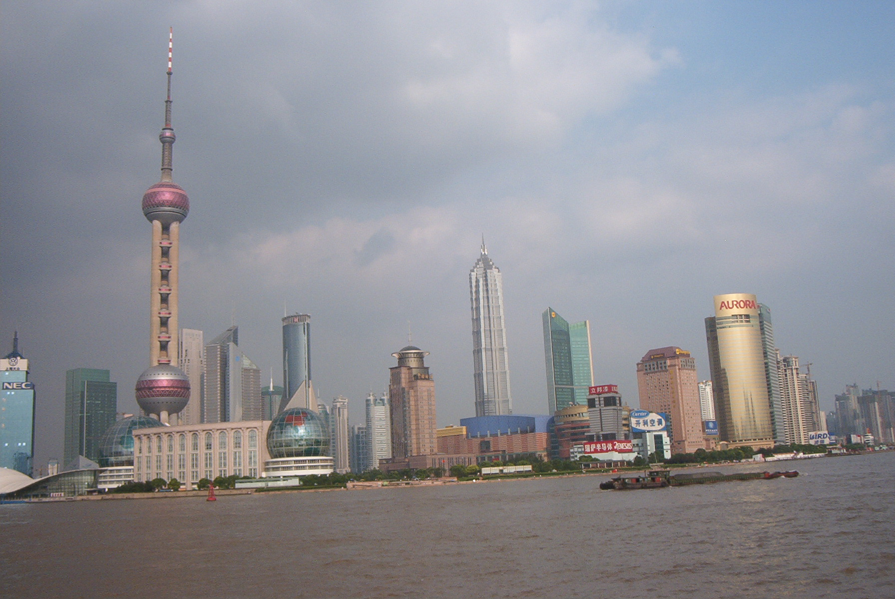 vue de PuDong depuis le Bund